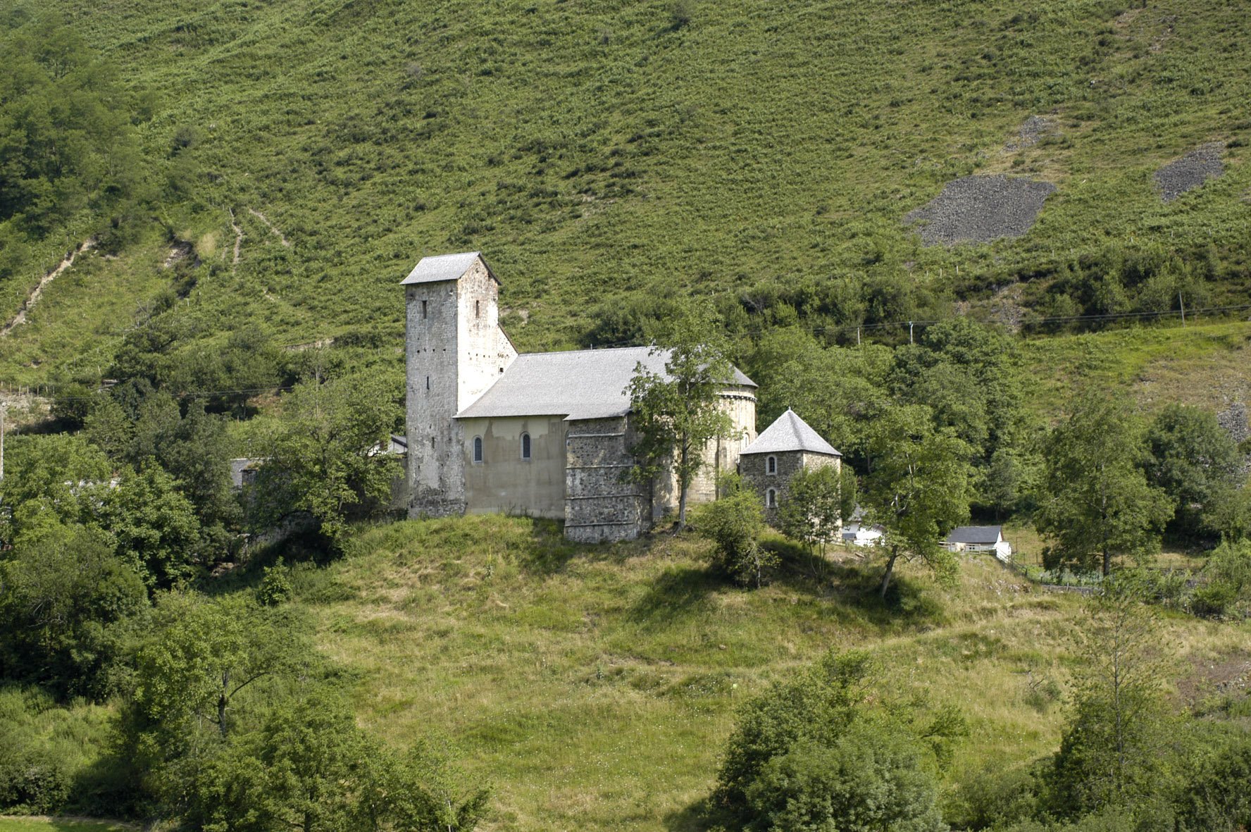 L'église du XIe s. Photo Lefrancq. Mons. 2003.